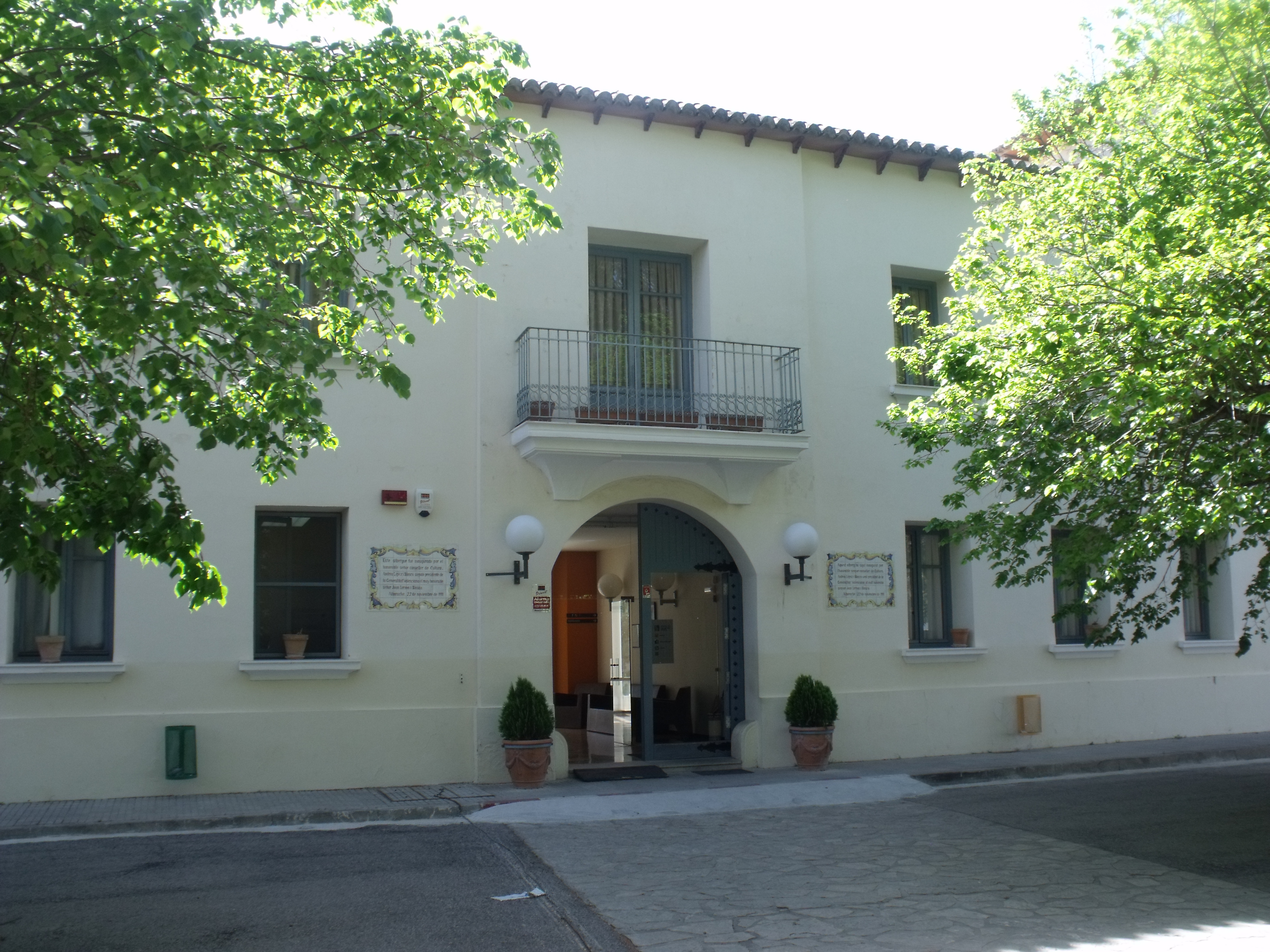 Alberg juvenil Torre d'Alboraig